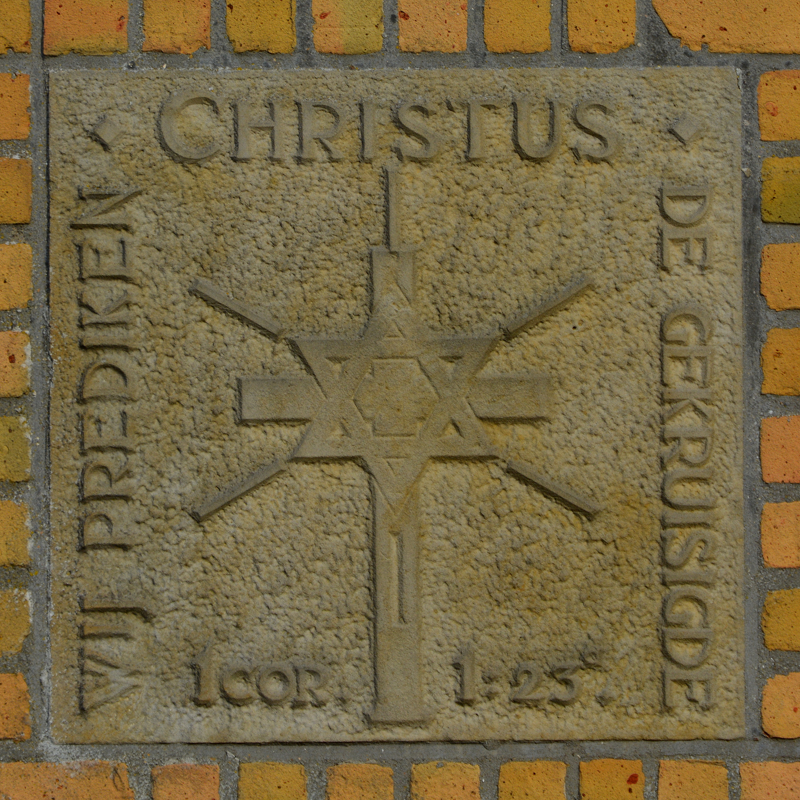 Harns, Grifformearde tsjerke, gevelstien